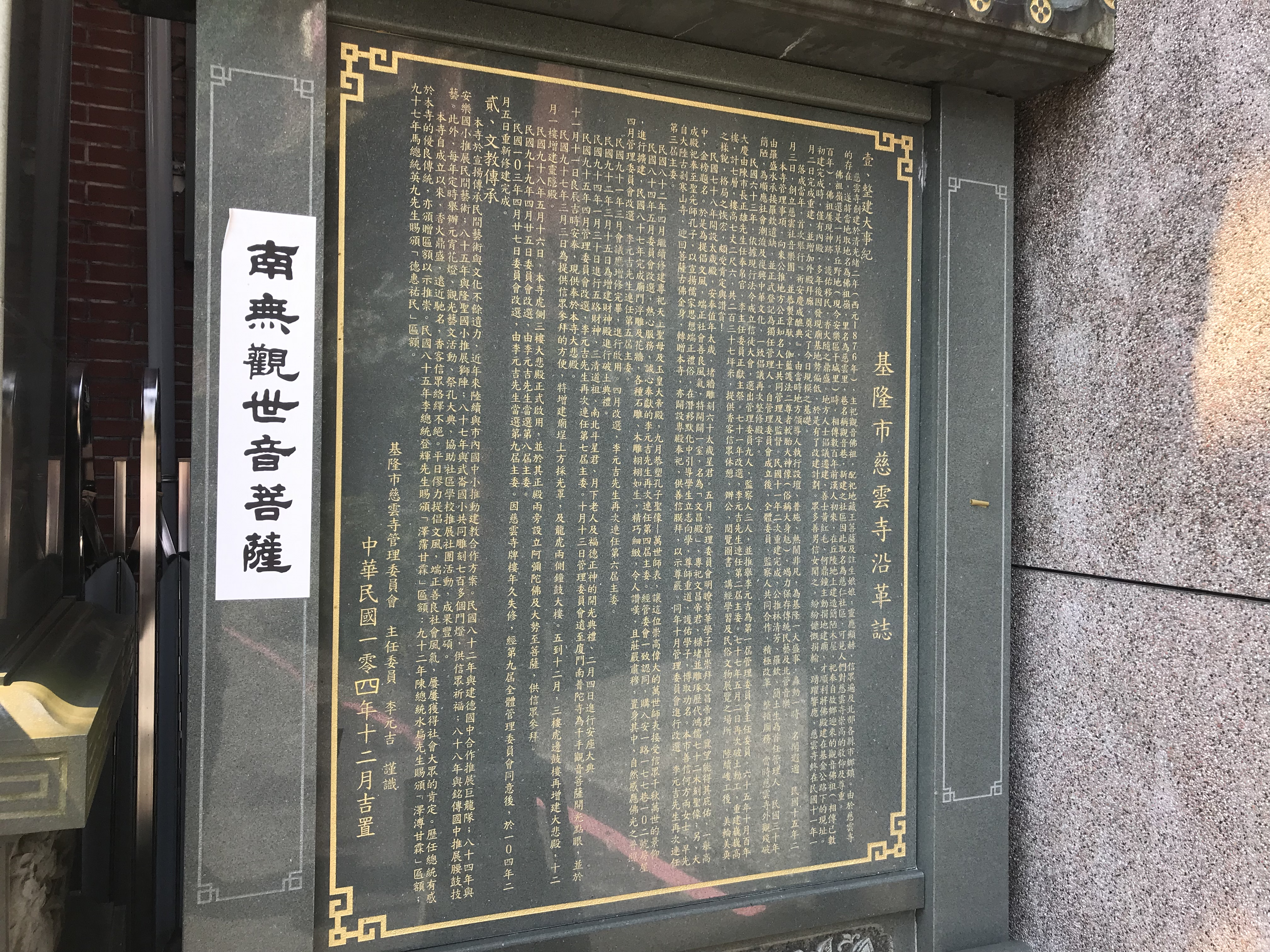 中文（台灣）: 基隆慈雲寺沿革